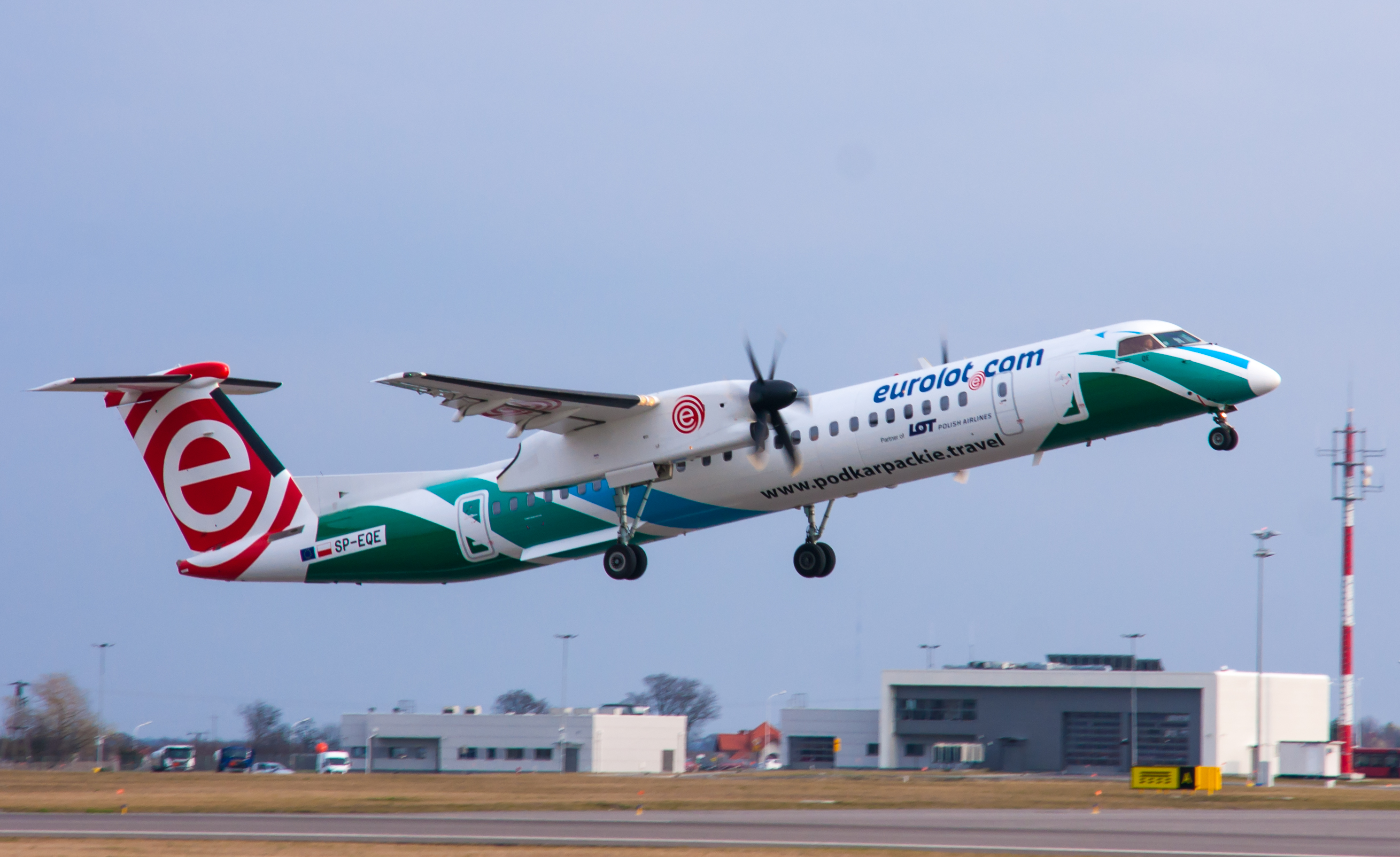 Bombardier Q400 linii lotniczych Eurolot startujący z lotniska w Lublinie.